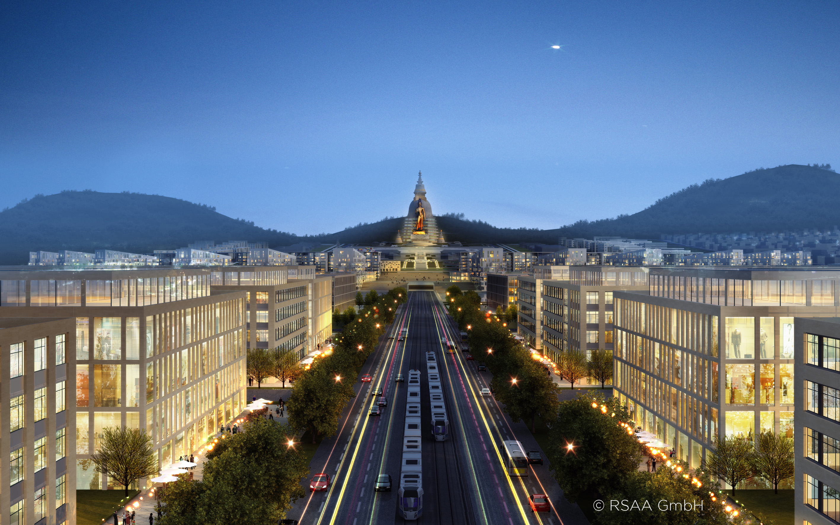 Hauptverbindungsachse zwischen religiösem und politischen Bezirk